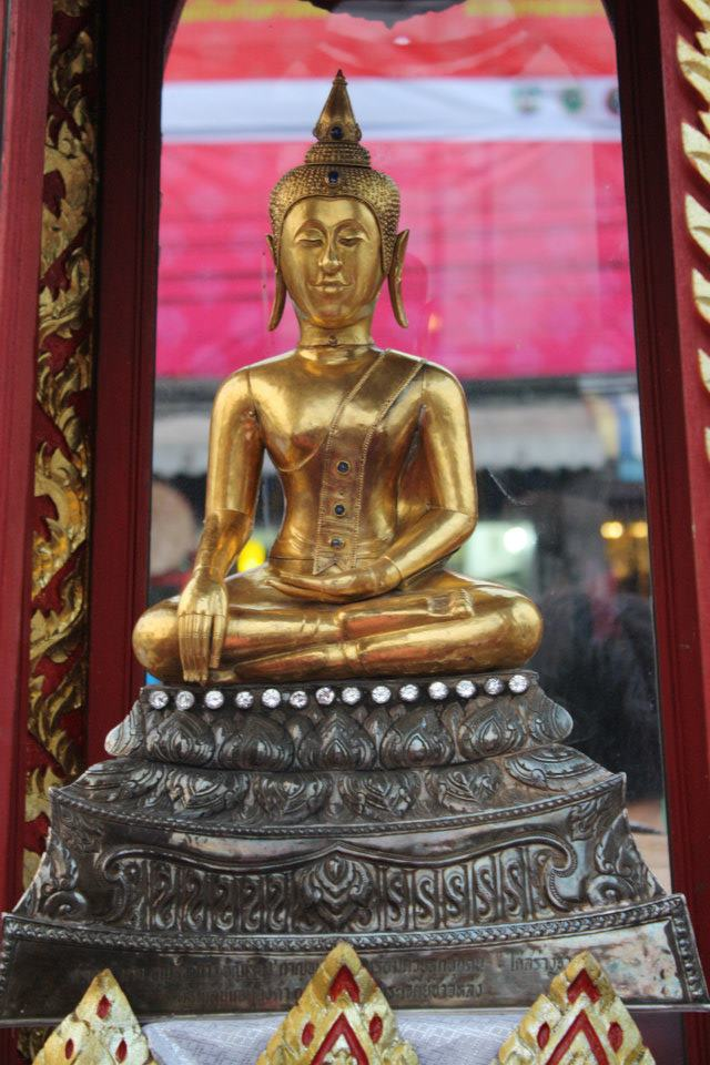 พระเจ้าแสนแซ่ทองคำ